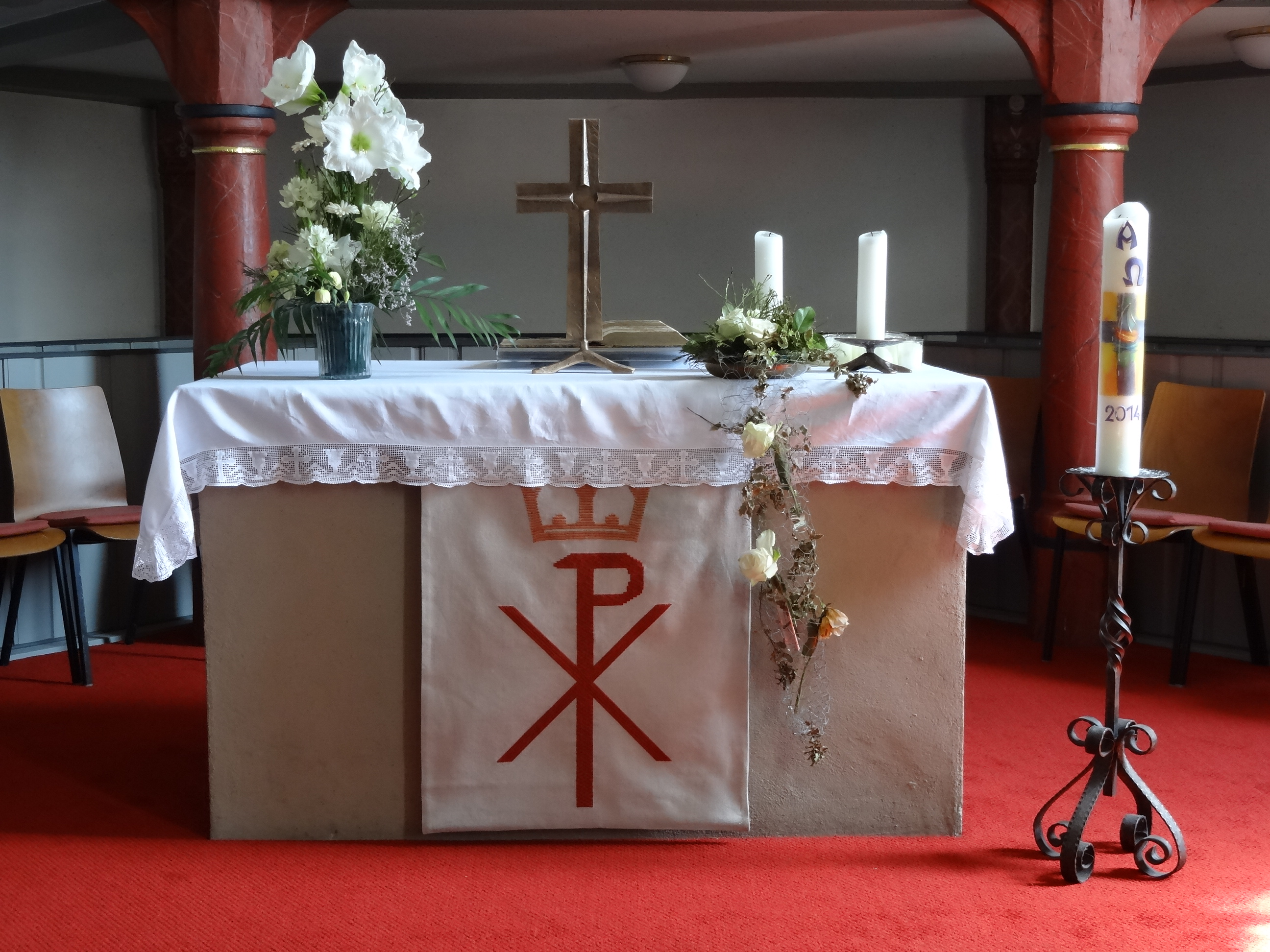 Evangelische Kirche Eberstadt